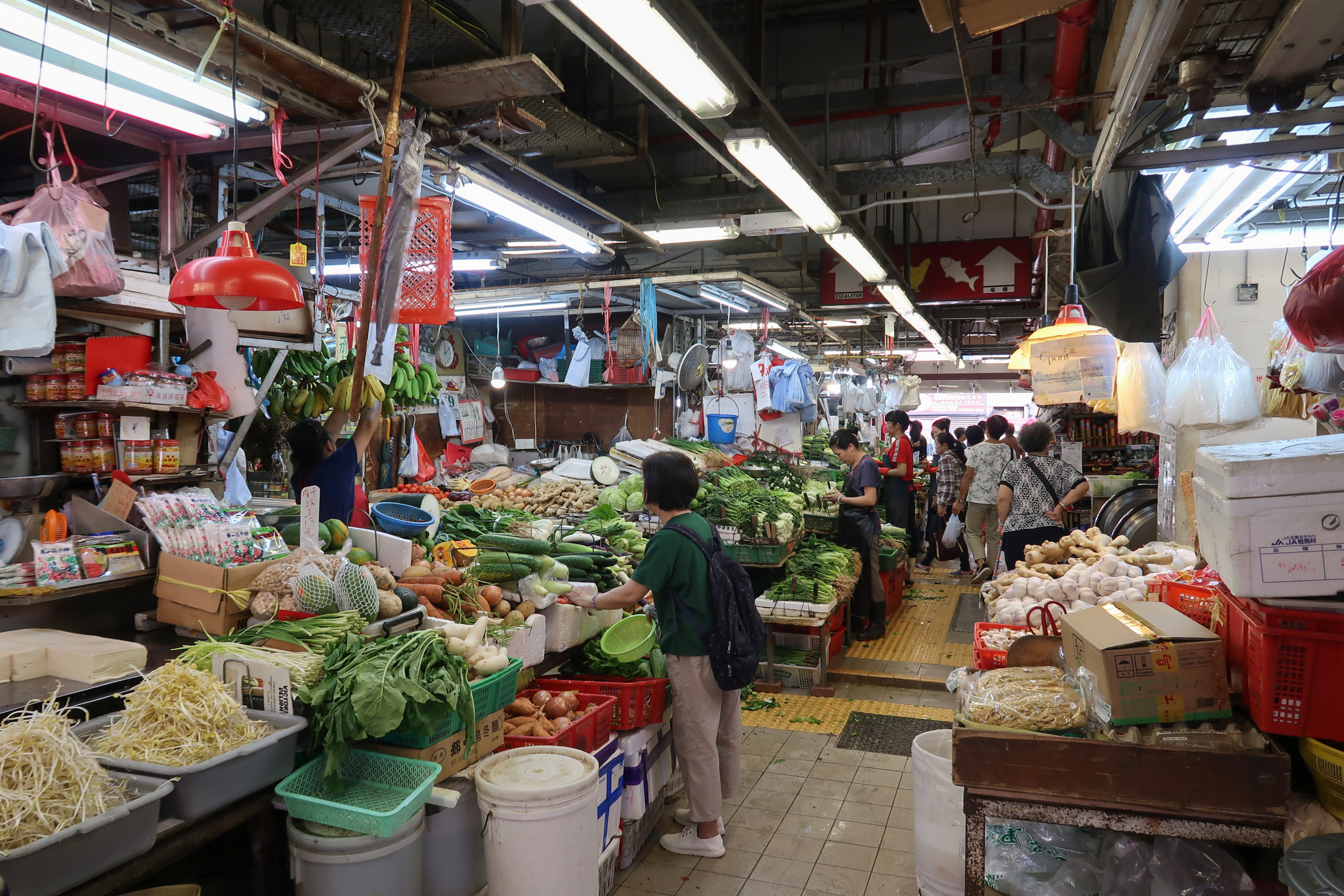 Tsuen Wan Market Interior